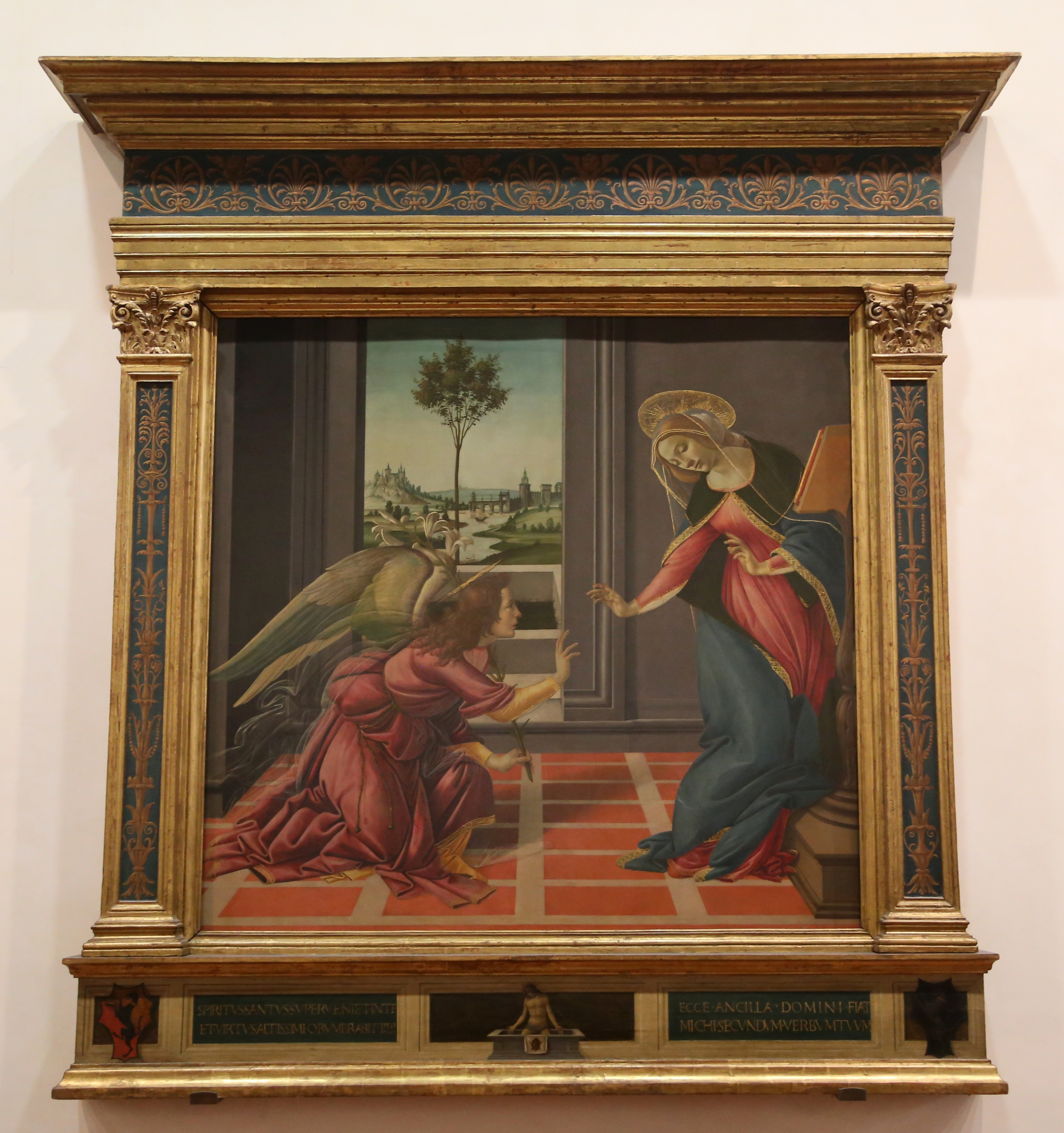 Botticelli: Annunciazione di Cestello, ca. 1489-90, Uffizien, Florenz